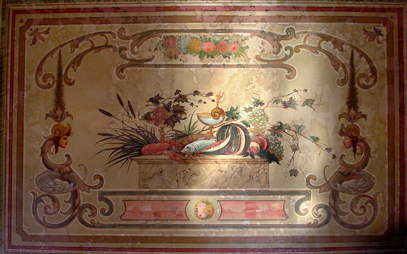 Interior do Solar dos Câmaras, pintura mural no antigo salão de refeições, Porto Alegre, Brasil.